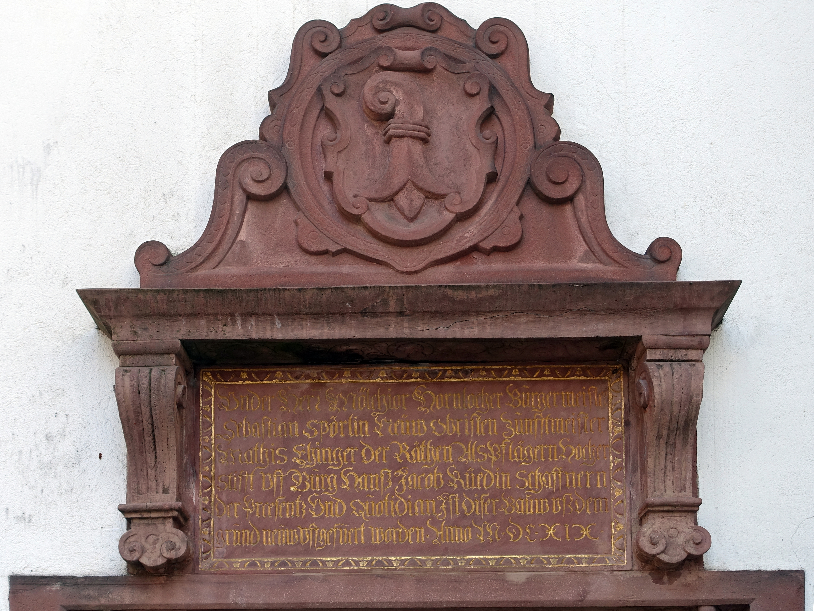 Rittergasse Basel. Gedenkinsschrift. Sebastian Spörlin (1560–1644) Politiker, Gesandter und Bürgermeister von Basel